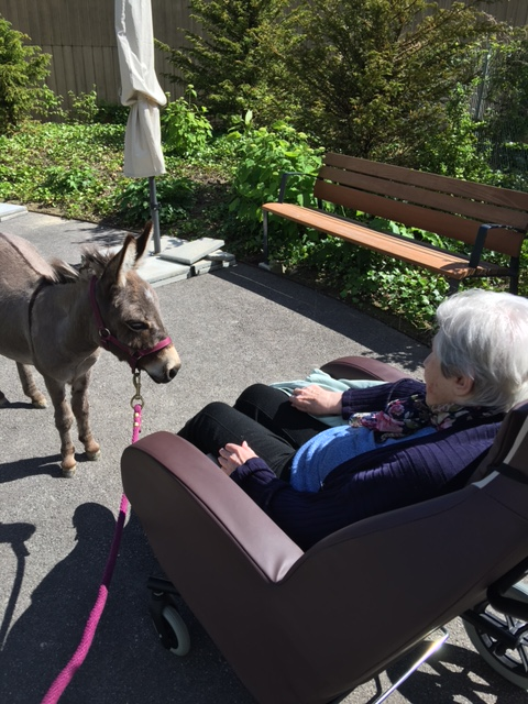 Séance asinotherapie avec ânes miniatures adaptée aux personnes âgées en fauteuil